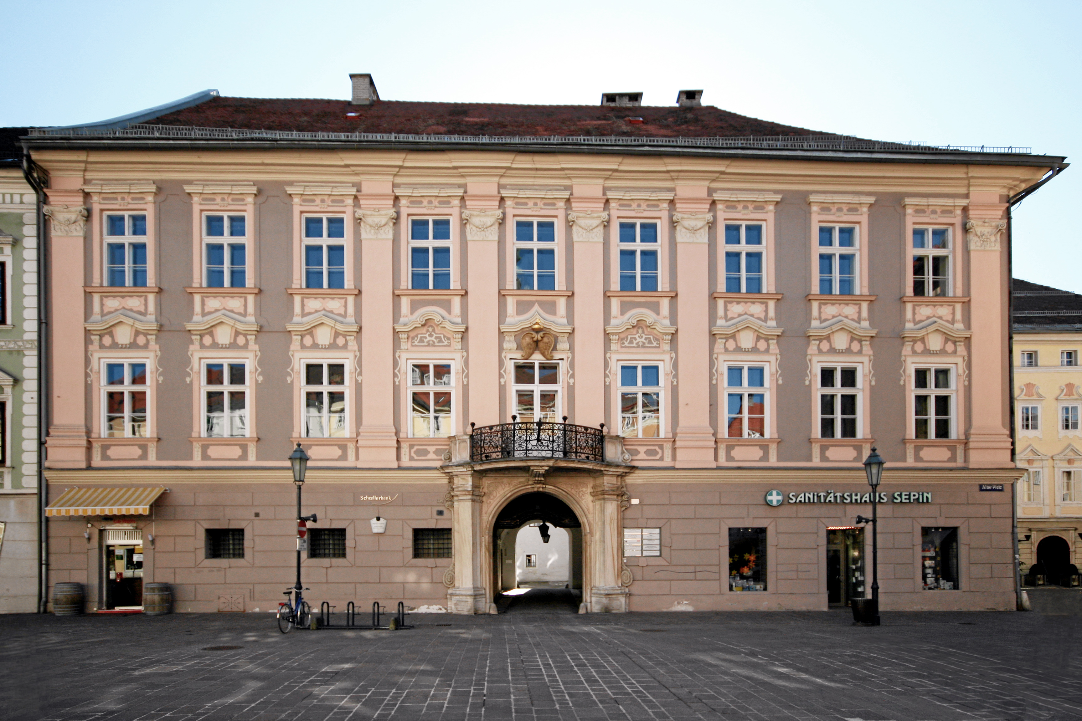 Palais Goess, Alter Platz Nr30, Klagenfurt